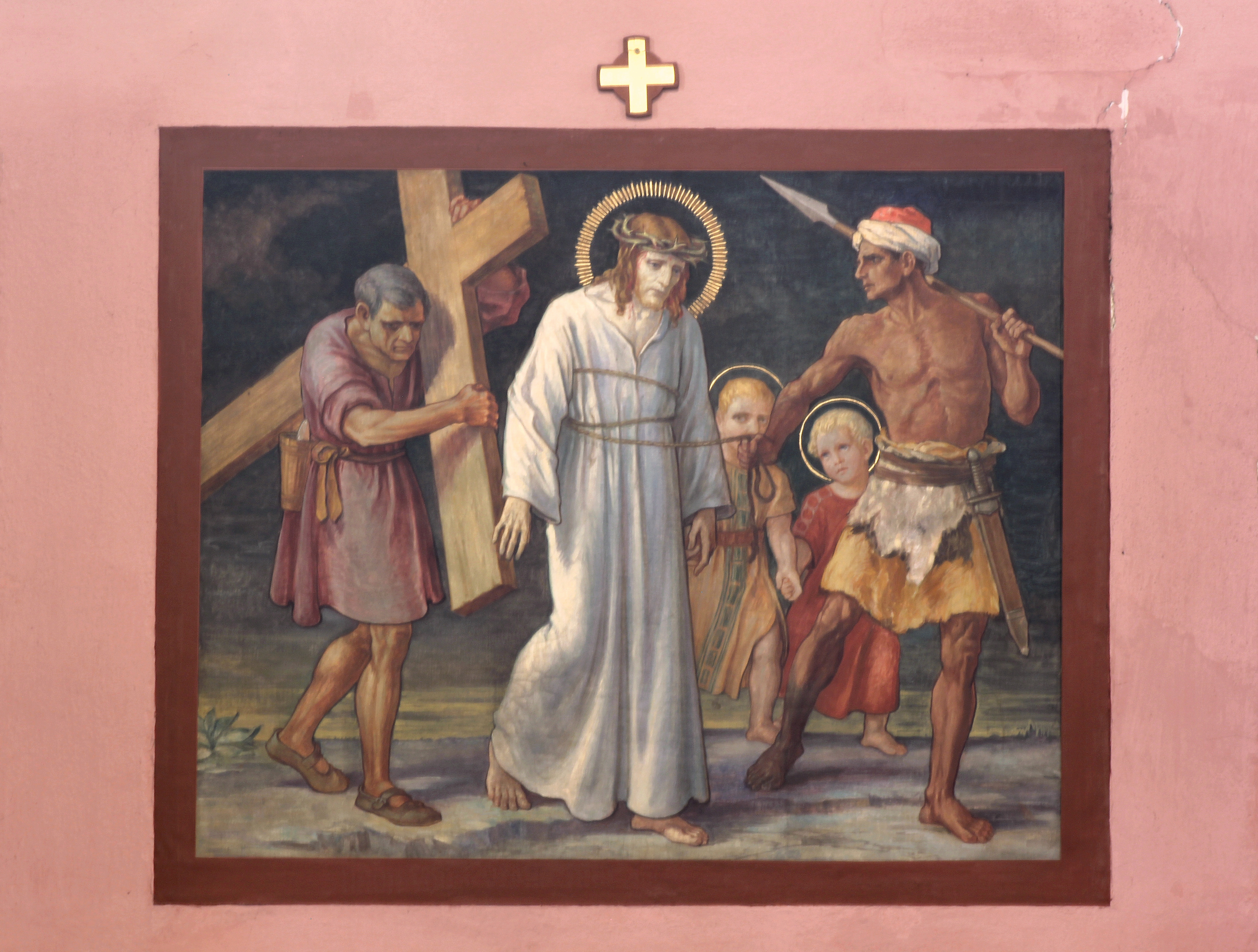 Pfarrkirche Kärlich, 5. Station des Kreuzweges: Simon von Cyrene hilft Jesus das Kreuz tragen; Georg Kau († 1947)